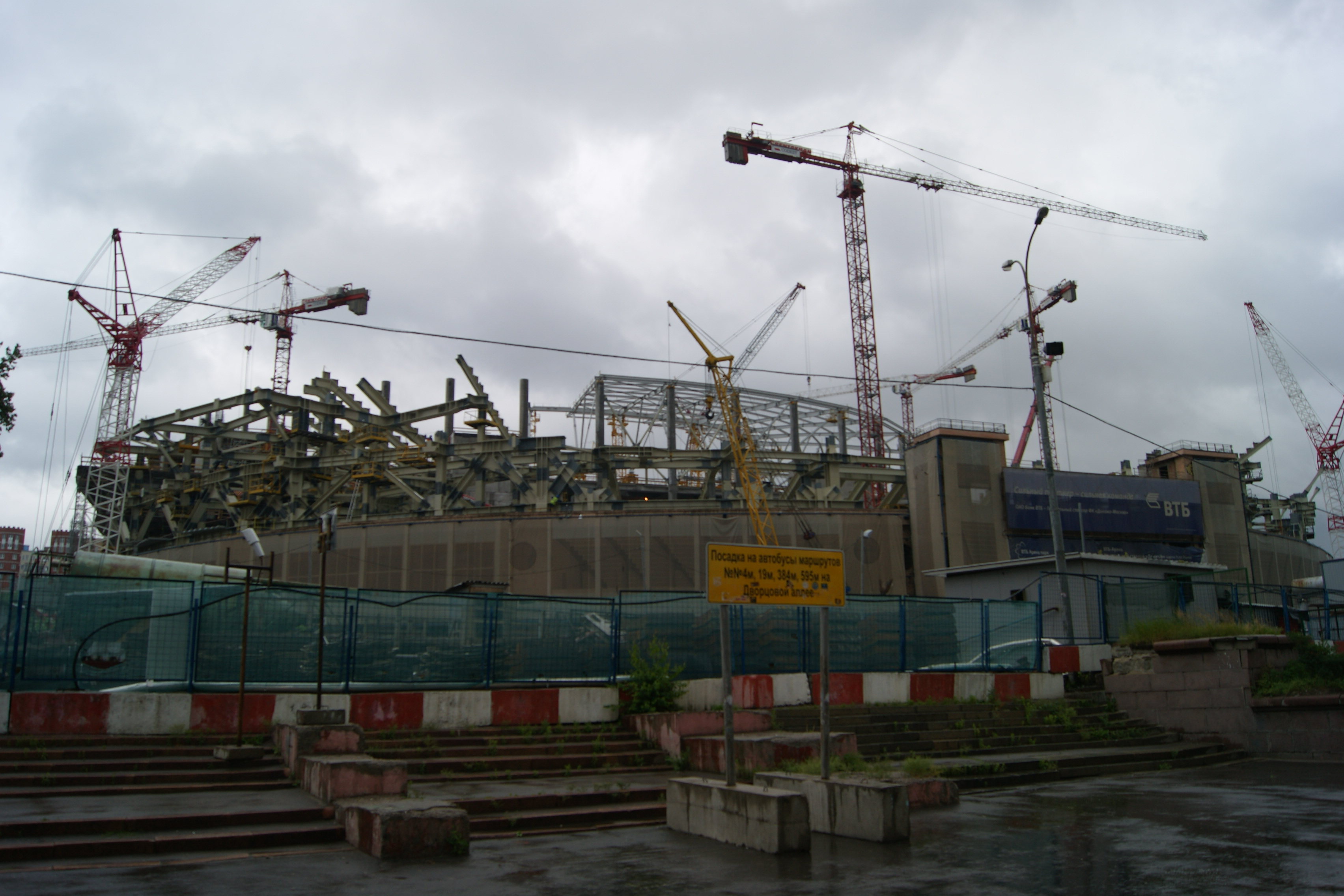 Стадион "Динамо" на реконструкции